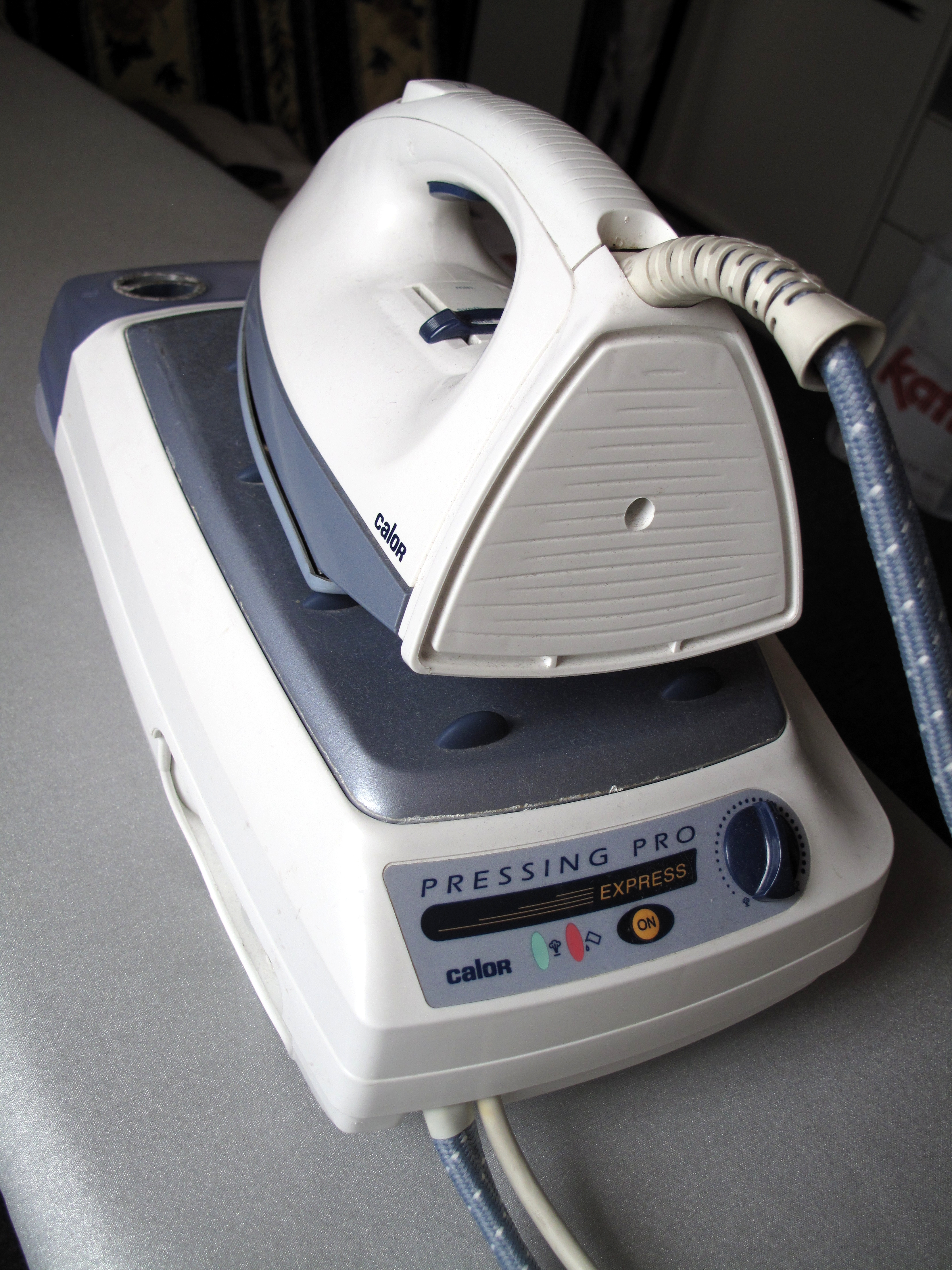 Photo d'une centrale vapeur